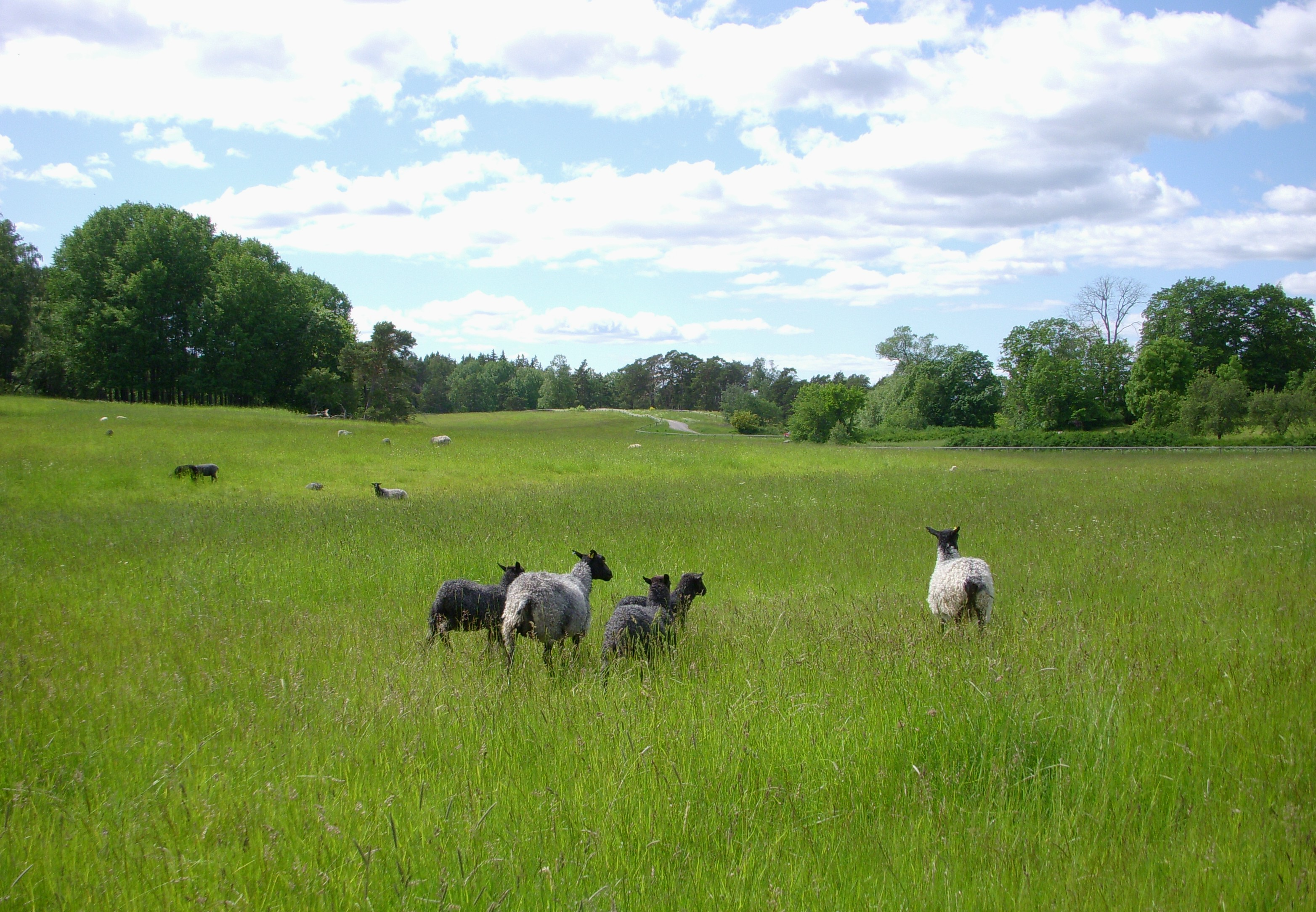 Kulturlandskapet på Lidingö i närheten av Elfvik